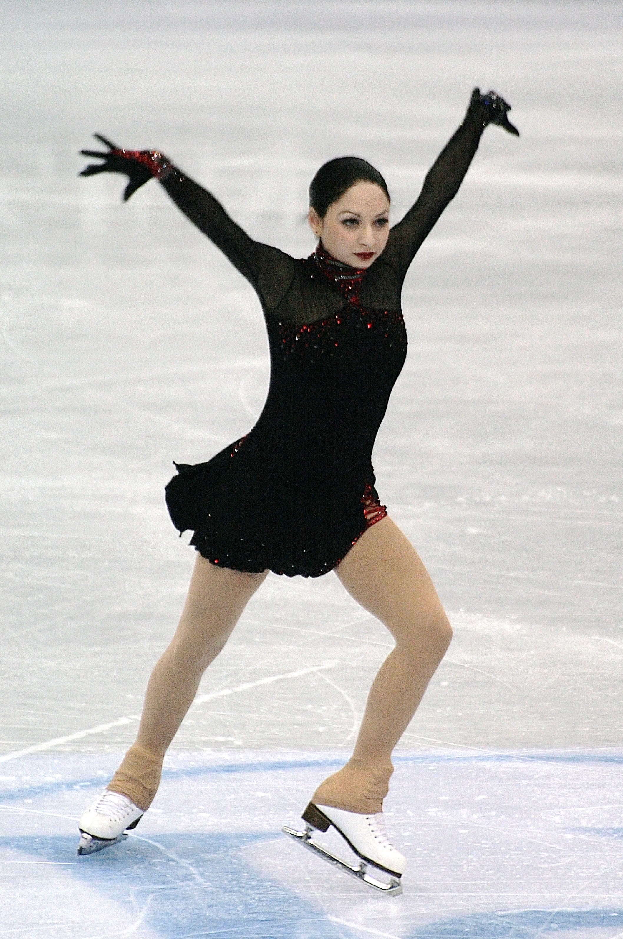 Элене Гедеванишвили (Грузия) на чемпионате мира по фигурному катанию 2012 года.